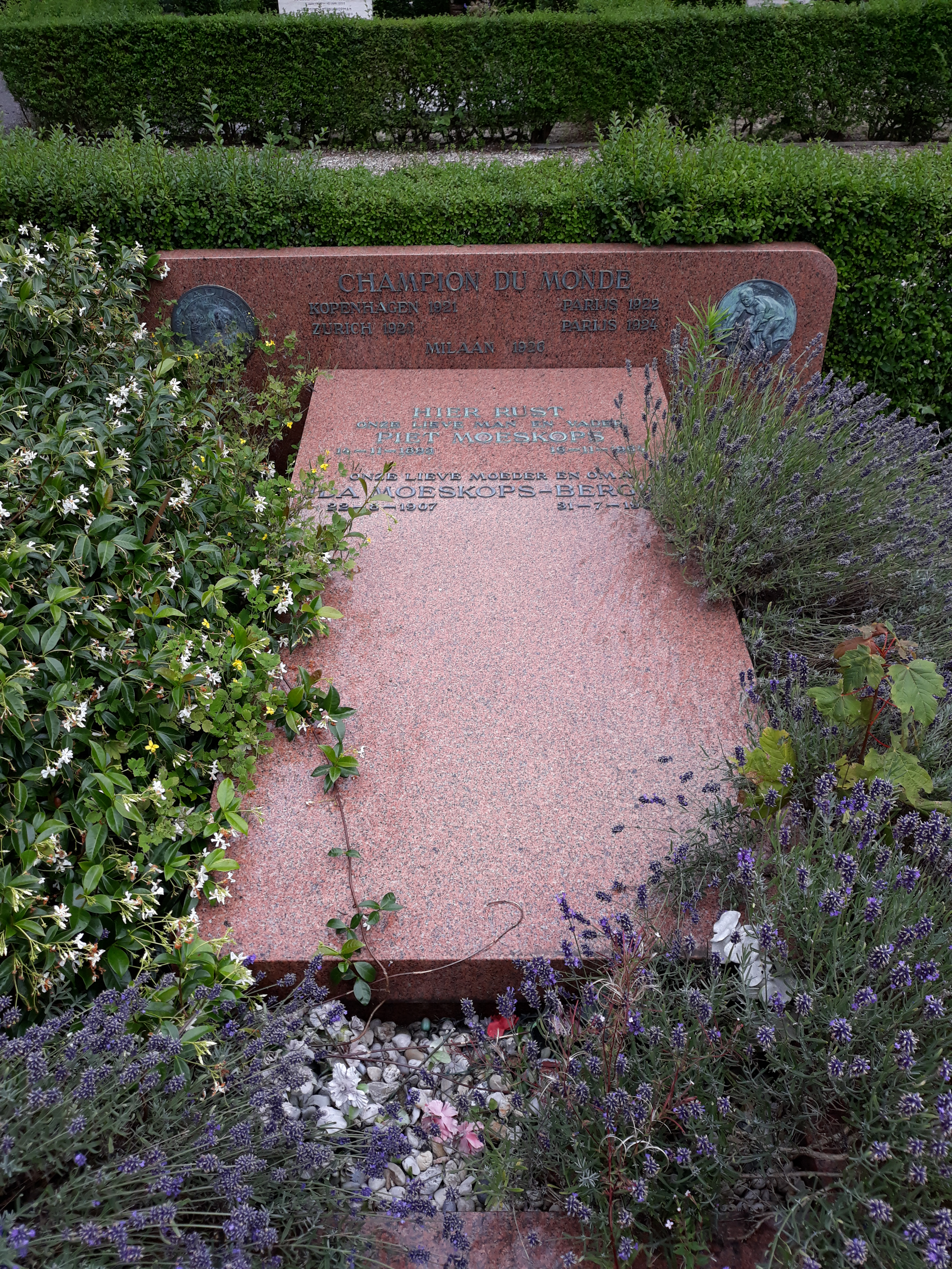 Das Grab des niederländischen Radrennfahrers Piet Moeskops auf dem Friedhof Oud Eik en Duinen in Den Haag.